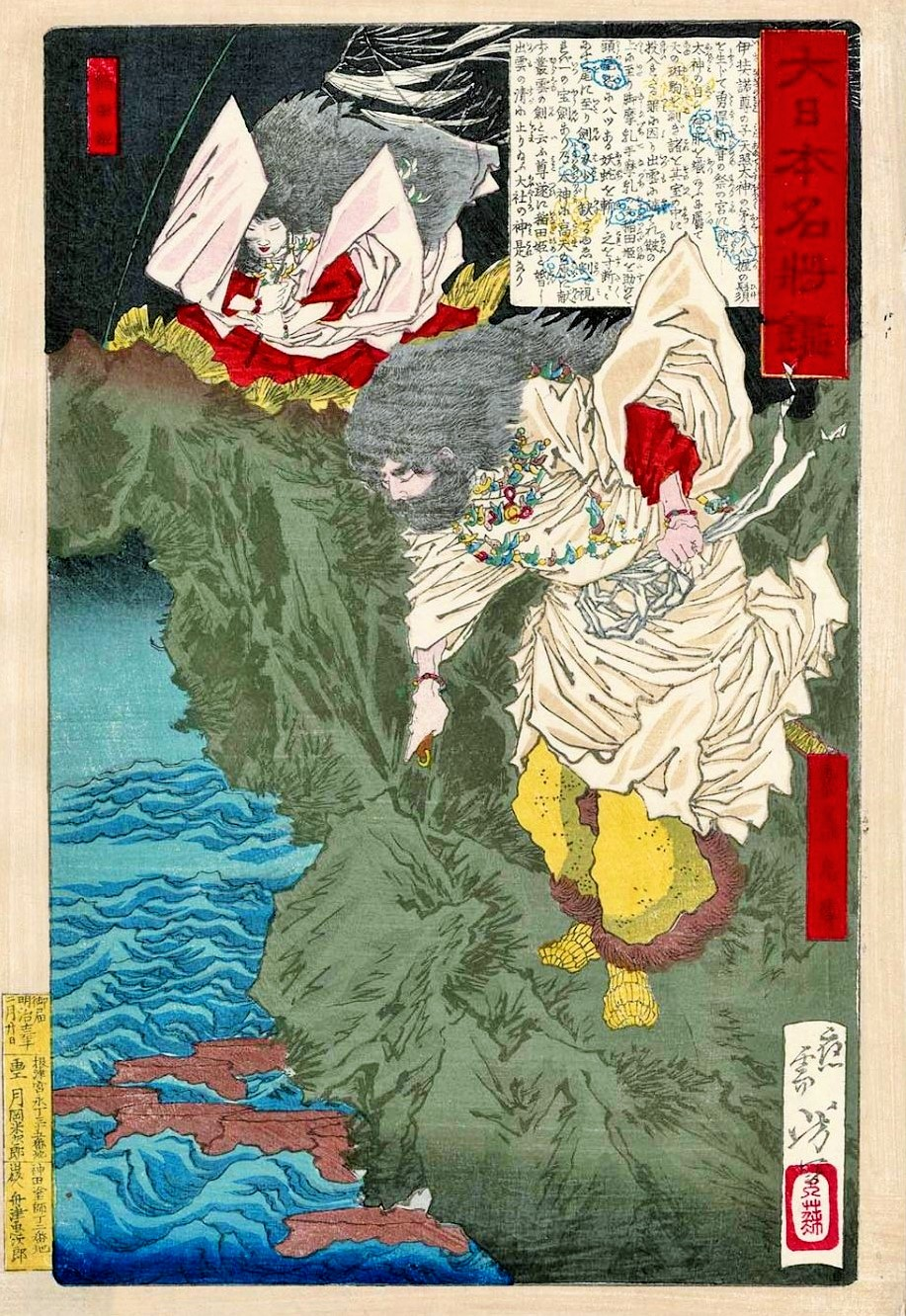 大日本名将鑑 素盞島尊 稲田姫。スサノオが稲田姫を救ったヤマタノオロチ伝説を描いたもの。須佐之男命が出雲の国、簸の川の川上に天降したとき一人の姫を連れて嘆き悲しんでいる老夫婦に会い、荒振る八岐の大蛇の話を聞いた。命は大蛇を退治しようと毒の酒を作って大蛇に飲ませ、酔いつぶれたすきに十握の剣で切り退治し、その尾先から天叢雲の剣を得た。次いでこの姫をめとり須賀の地に到り「八雲たつ出雲八重垣つまごめに八重垣つくるその八重垣を」と詠んだ